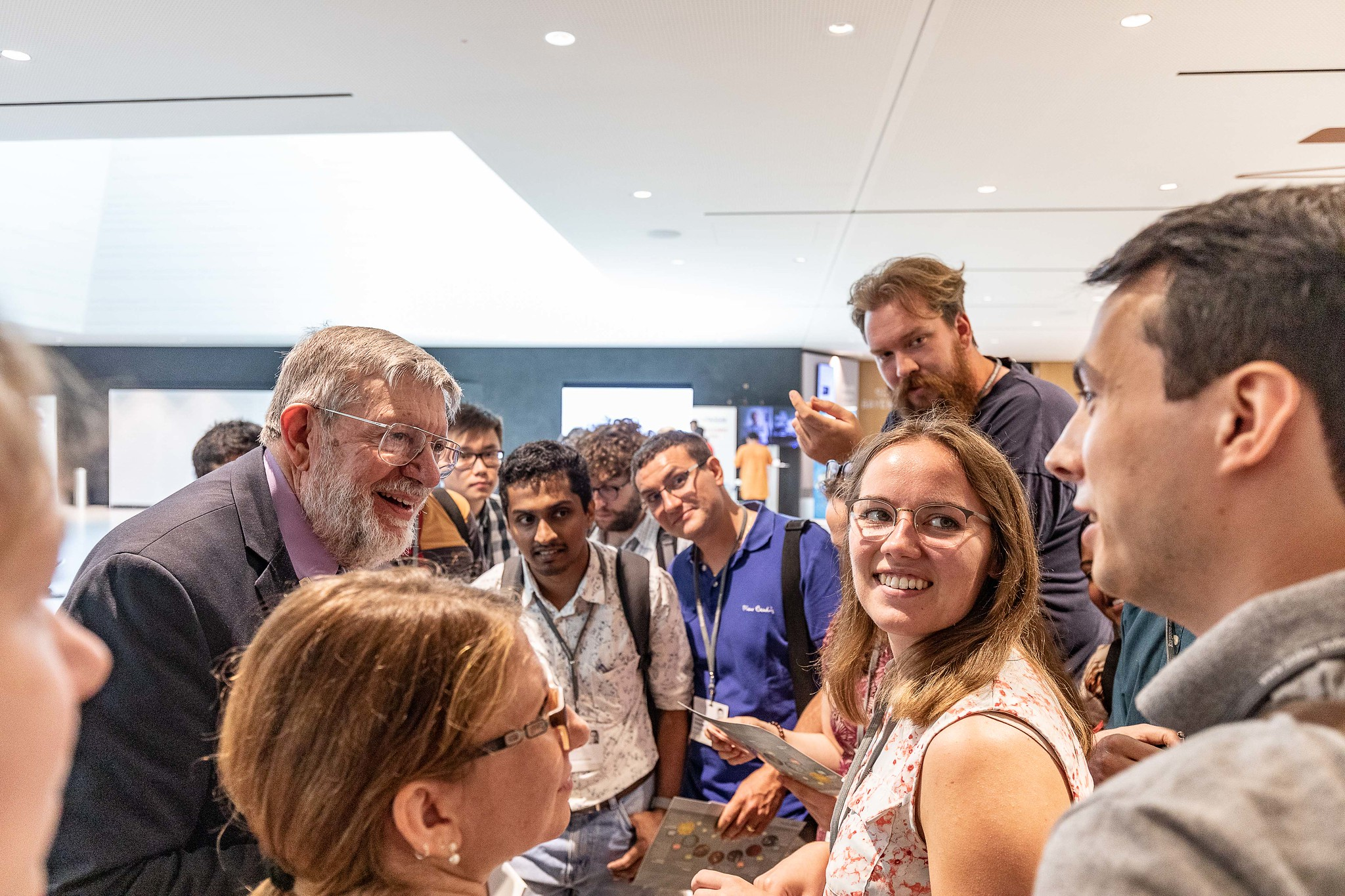 Nobelpreisträger William D. Phillips im Austausch mit Nachwuchswissenschaftlern während der 69. Lindauer Tagung